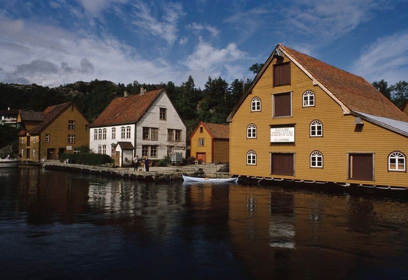 Rugsund handelssted og gjestgiveri. Foto: Even Gaukstad. Fra Riksantikvarens Kulturminnesøk.